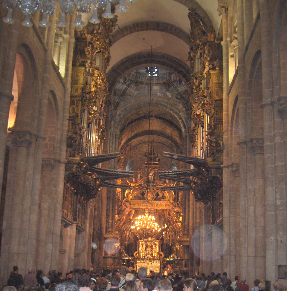 Altar mayor de la catedral de Santiago de Compostela.